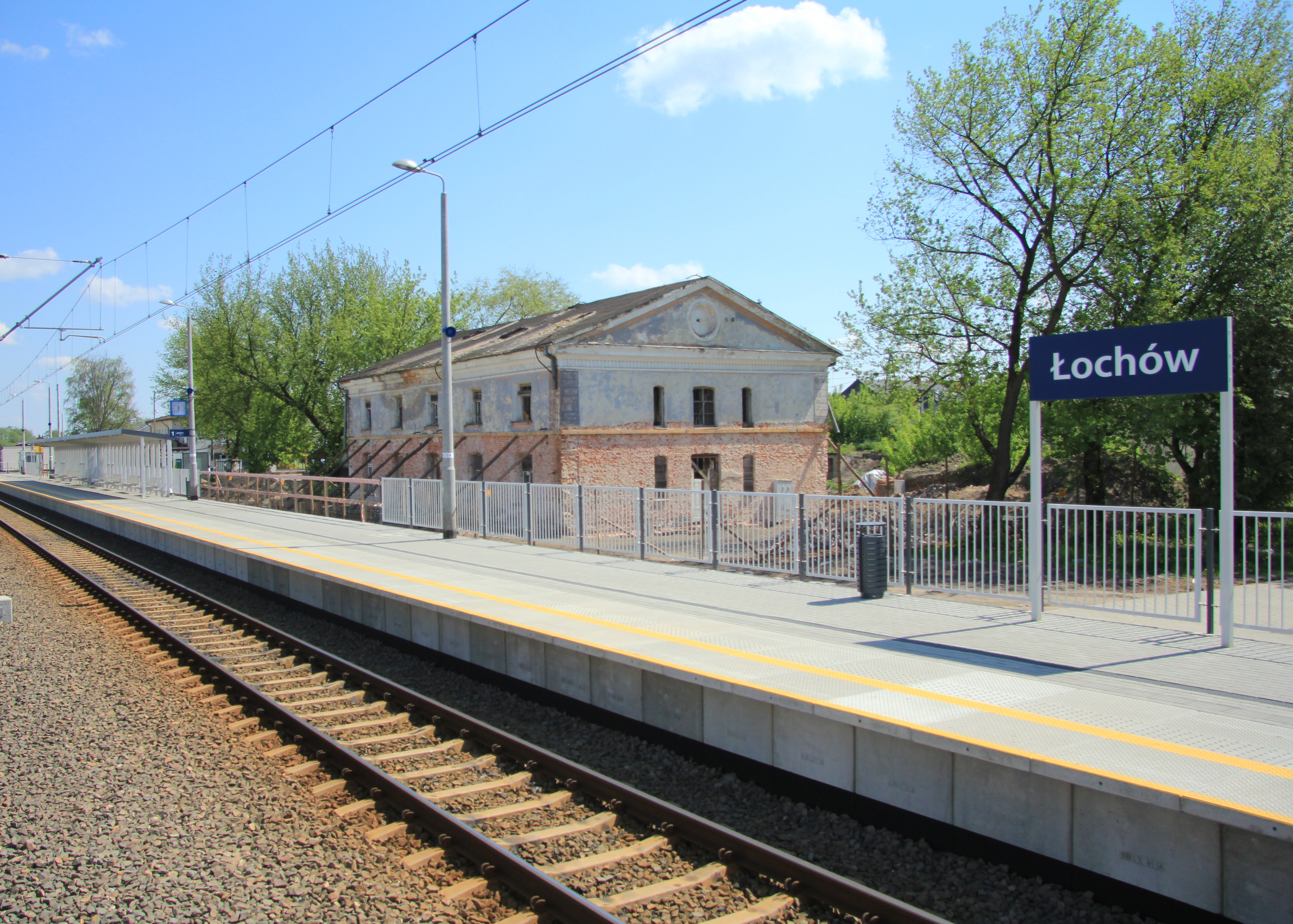 Łochów stacja kolejowa - woj. mazowieckie